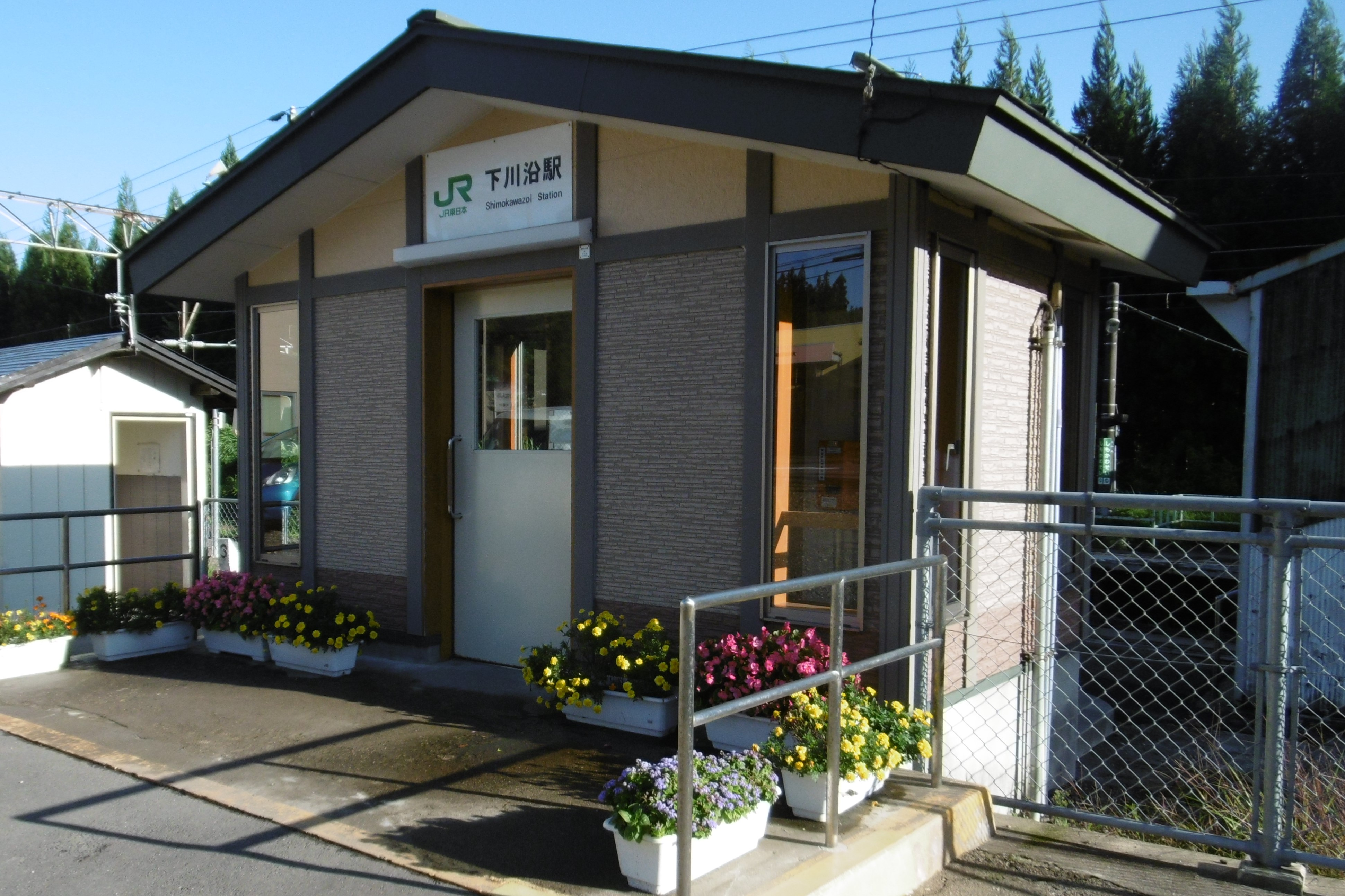 奥羽本線・下川沿駅